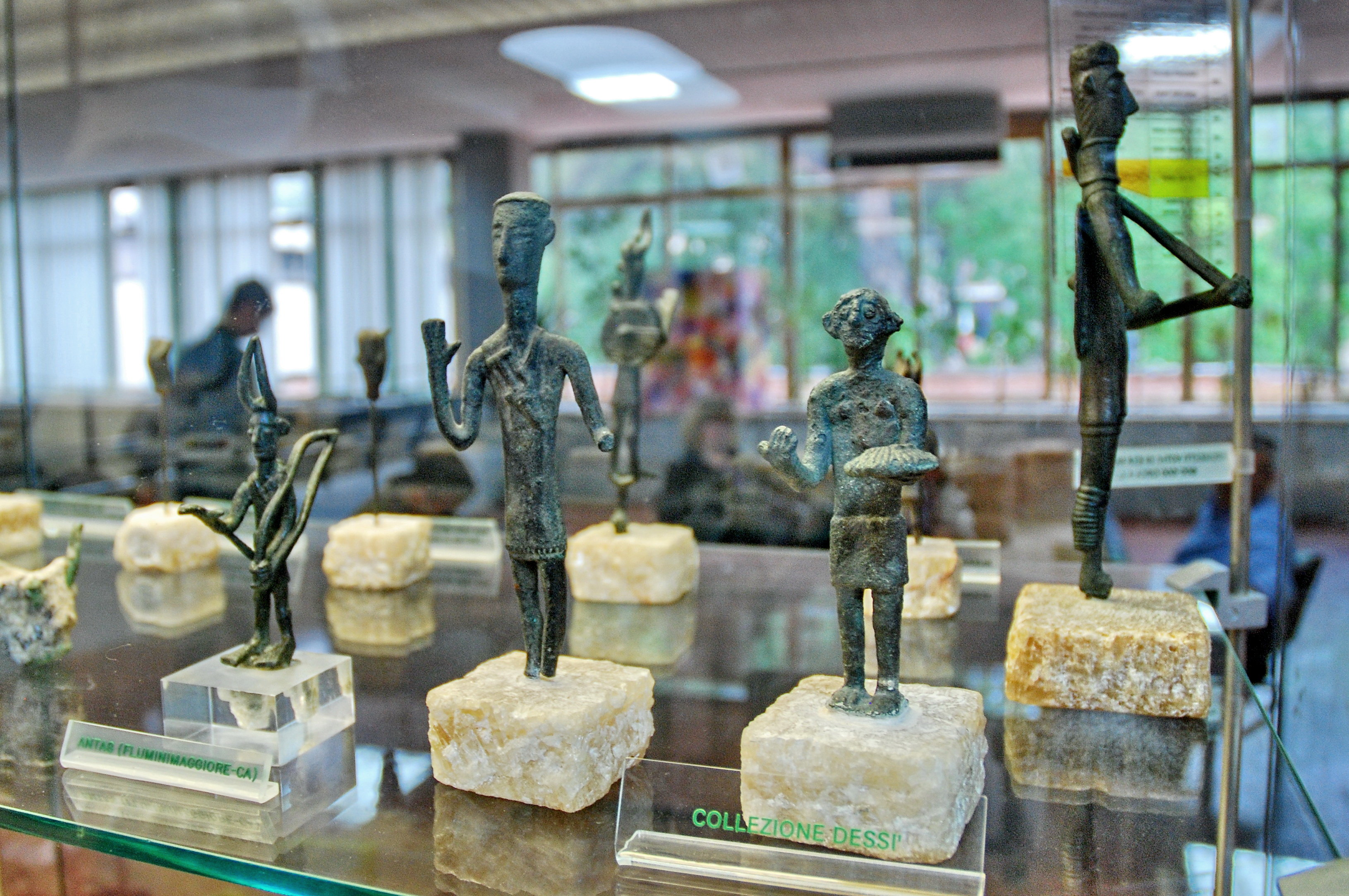 Museo archeologico nazionale G.A. Sanna - MIBAC This is a photo of a monument which is part of cultural heritage of Italy.